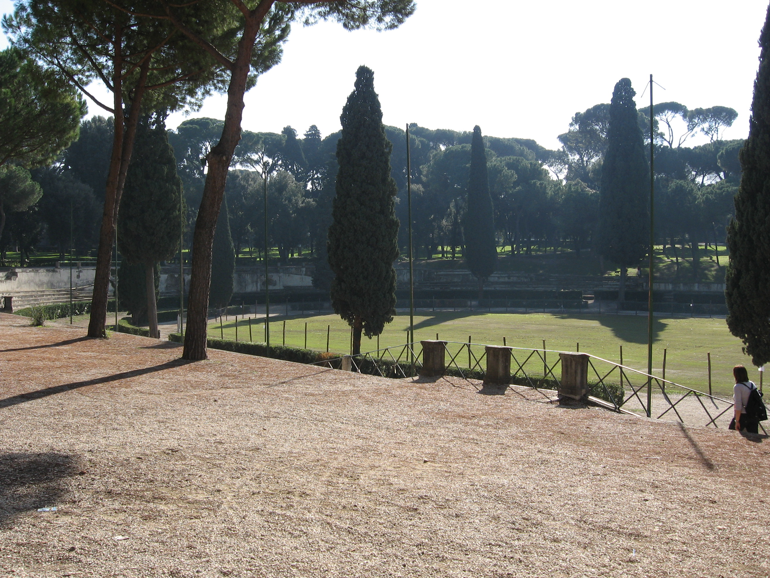 Piazza di Siena , Villa Borghese, Roma